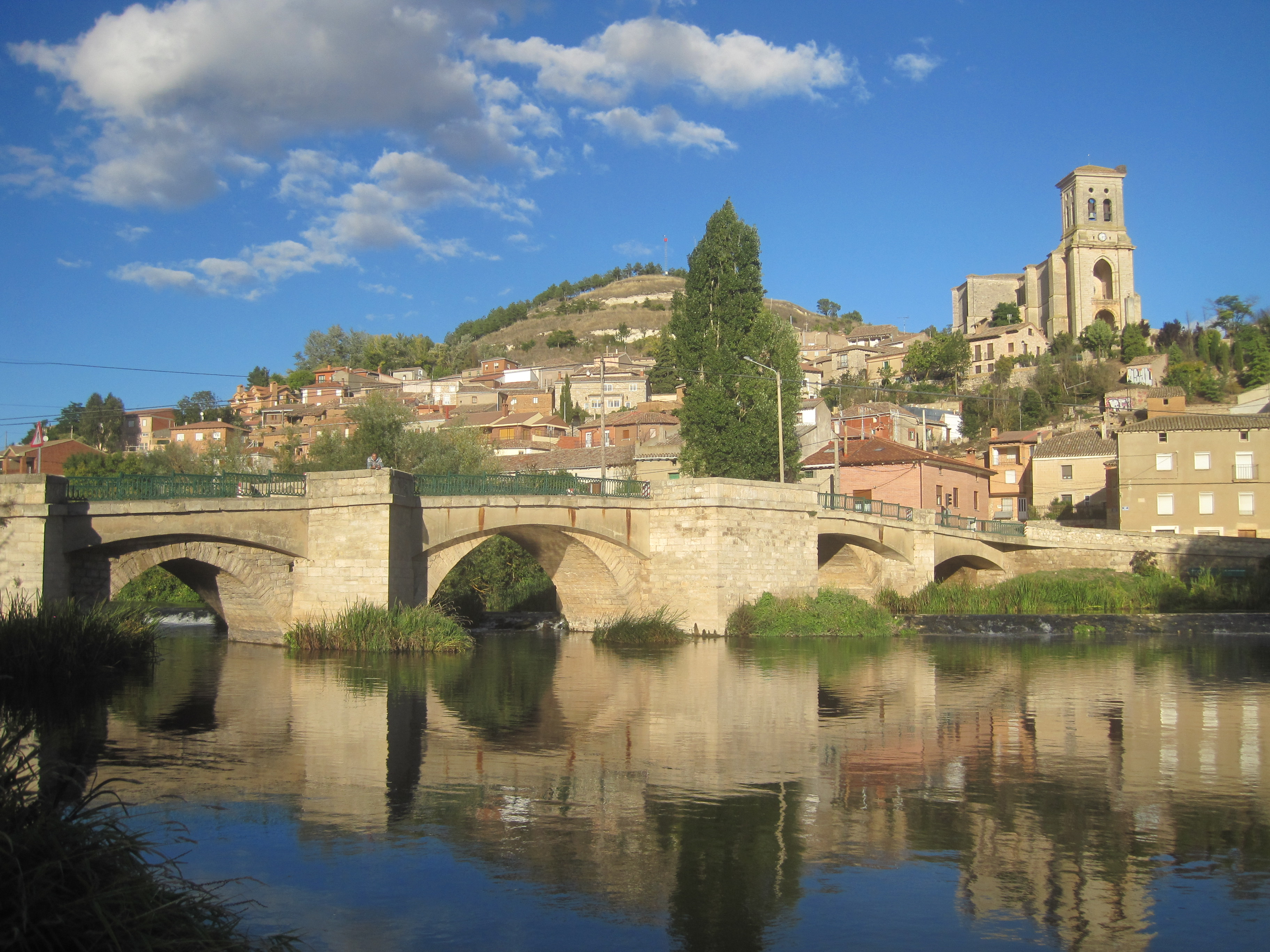 Vista de Pampliega desde el parque lineal junto al Arlanzón.